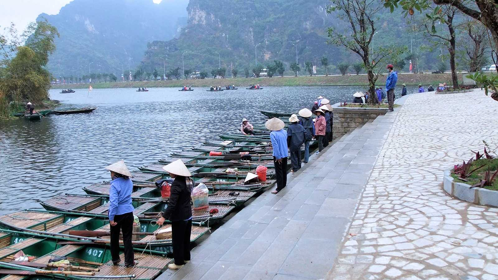 Bến Tràng An - cập nhật ảnh rõ, đúng với hiện tại và mang tính miêu tả hơn